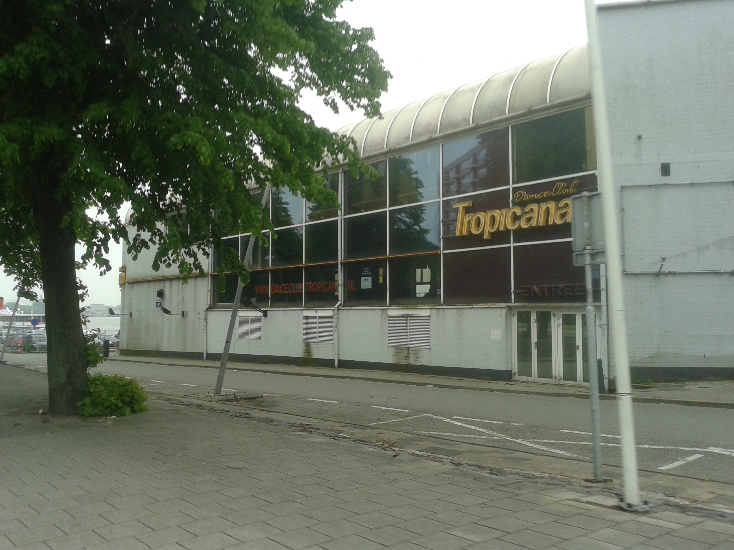 Rotterdam - 2013